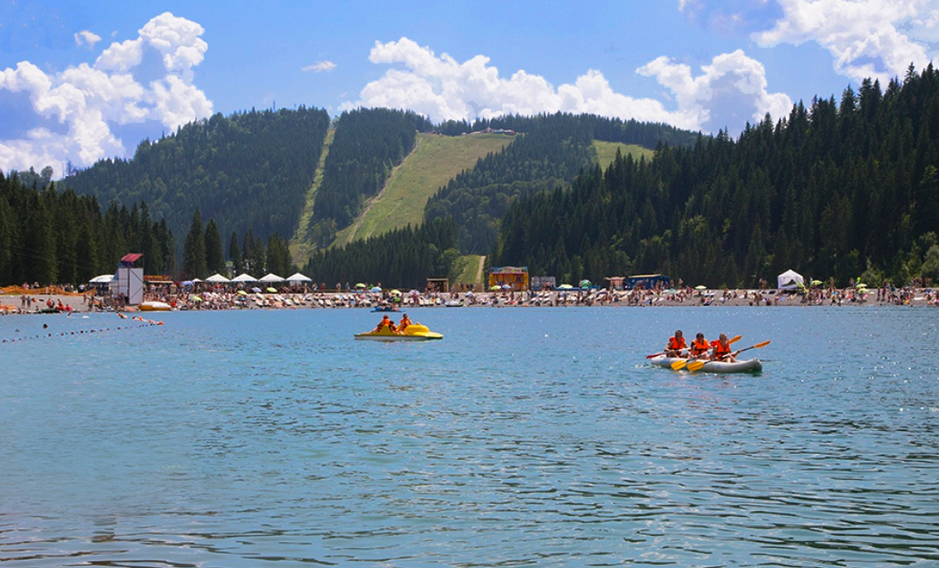 Большое озеро горнолыжного курорта Буковель. Одно из самых больших искусственных озер Украины